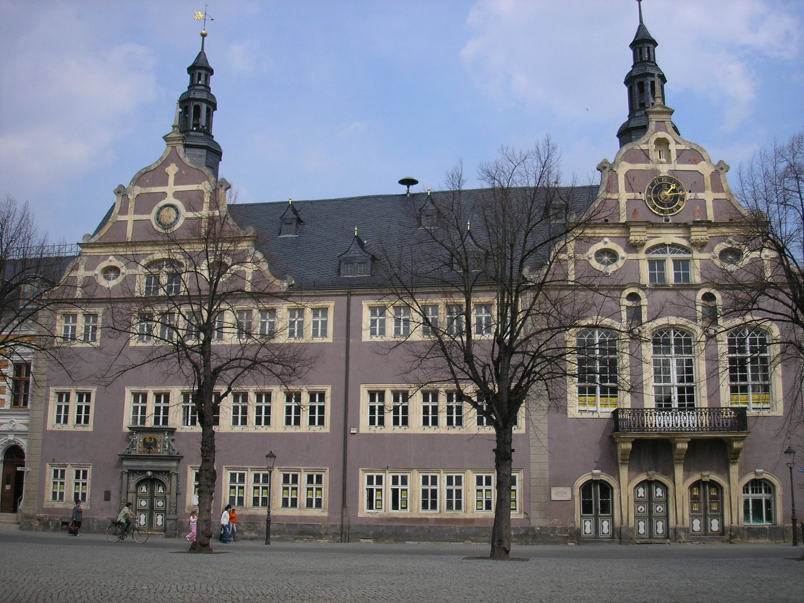 Rathaus von Arnstadt (Thüringen).